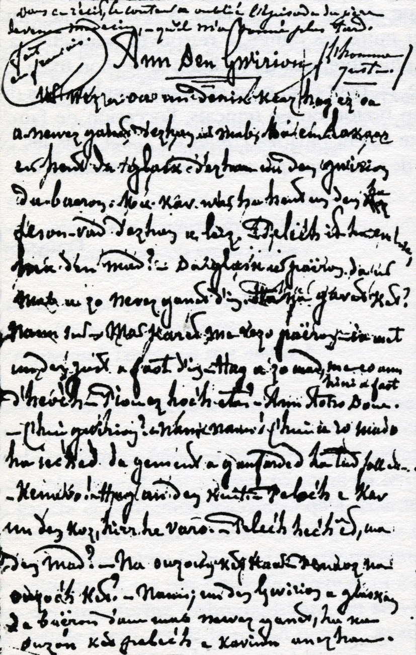 Page d'un carnet de François-Marie Luzel. Bibliothèque municipale de Rennes. Manuscrit 1031. Reproduit dans Les Contes de Luzel. Légendes chrétiennes de la Basse-Bretagne, Presses universitaires de Rennes-Terre de Brume, 2001.